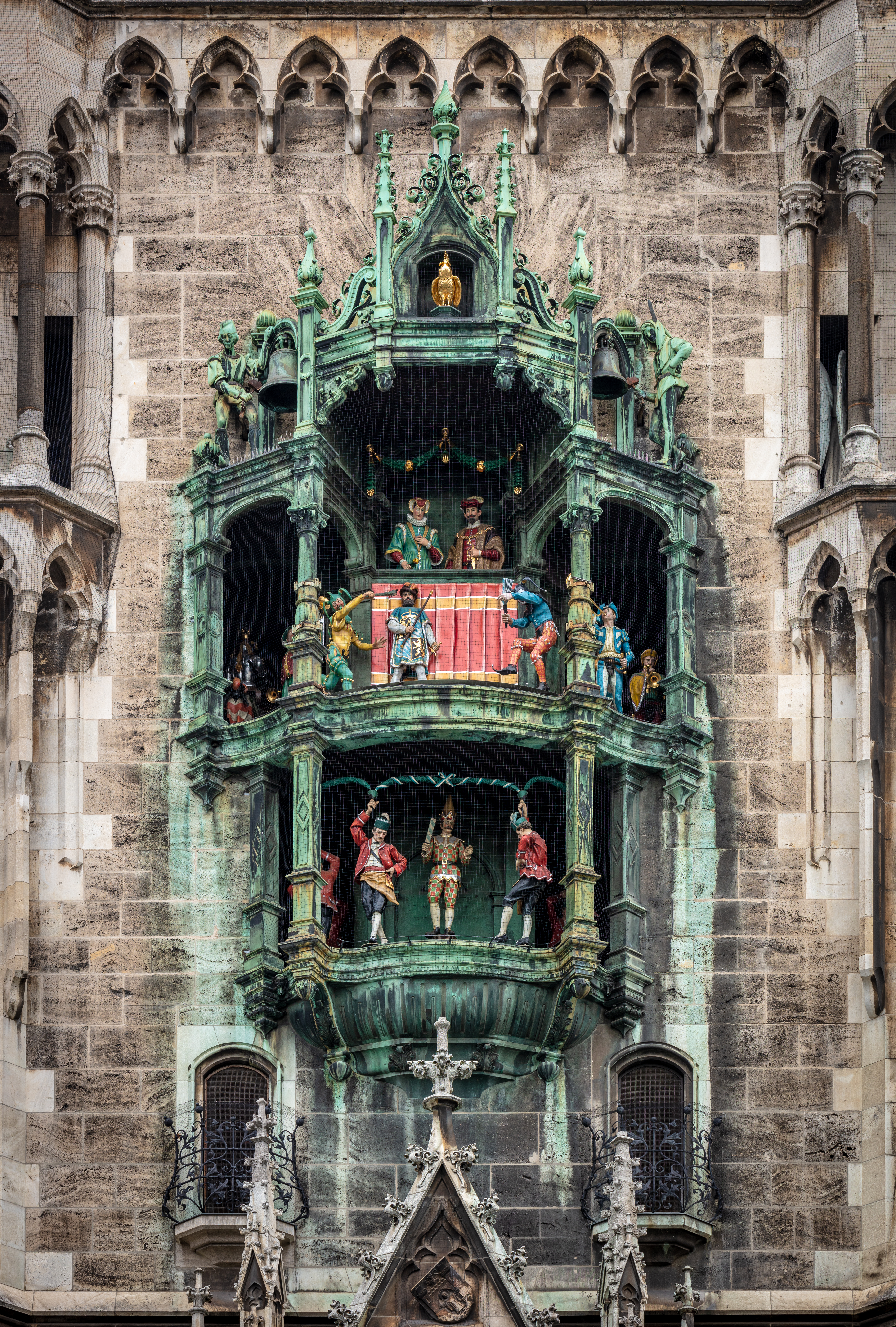 Glockenspiel am Neuen Rathaus in München.